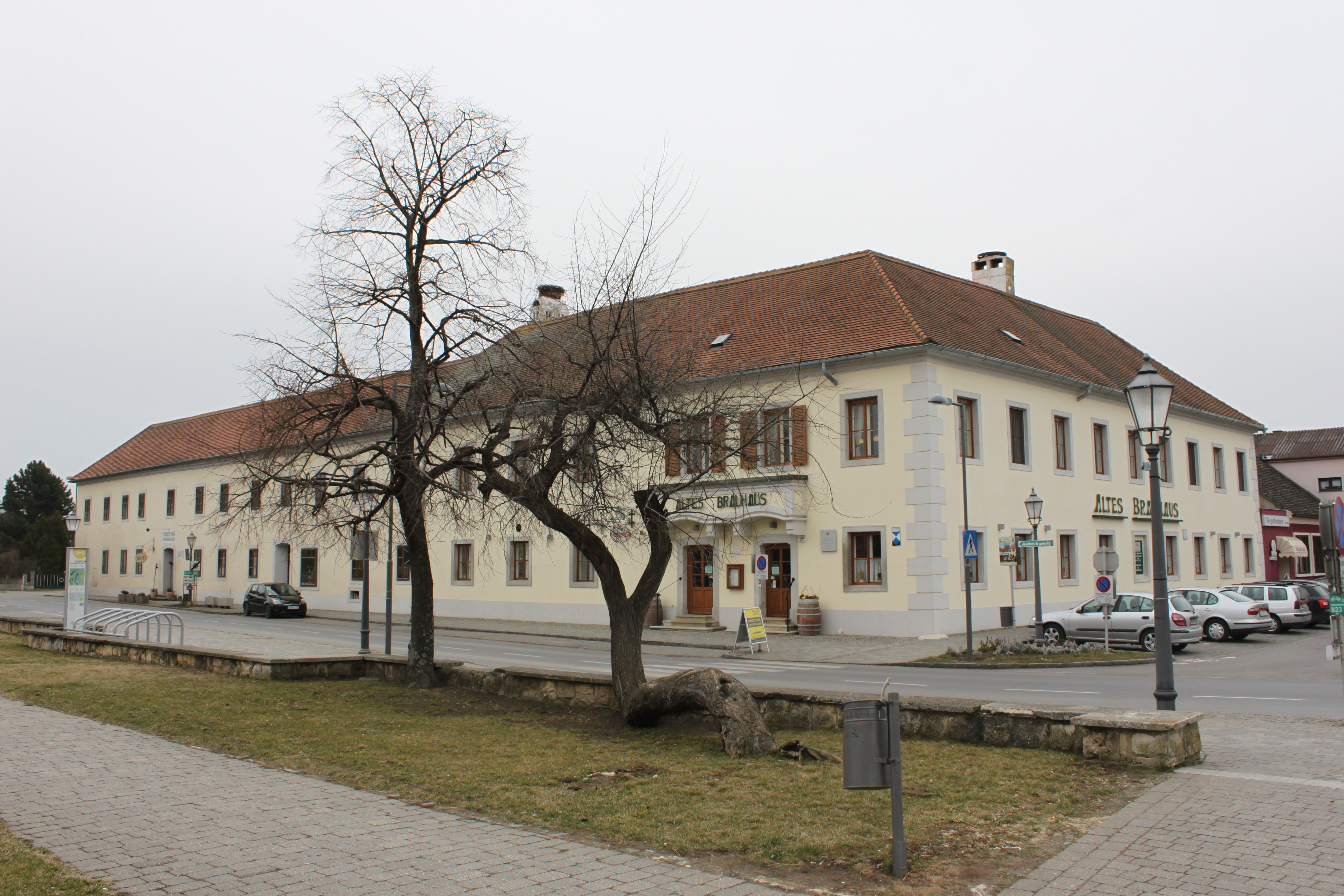 Altes Brauhaus in Frauenkirchen, Burgenland